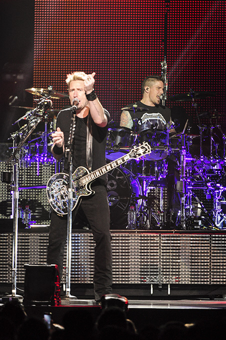 Nickelback @ Perth Arena (17 11 2012)